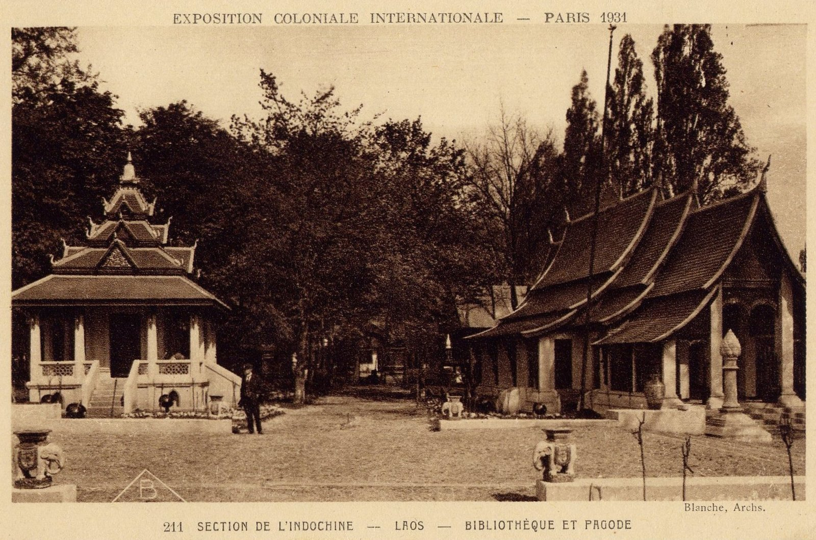 Pavillon du Laos à l'Exposition Coloniale de PARIS en 1931